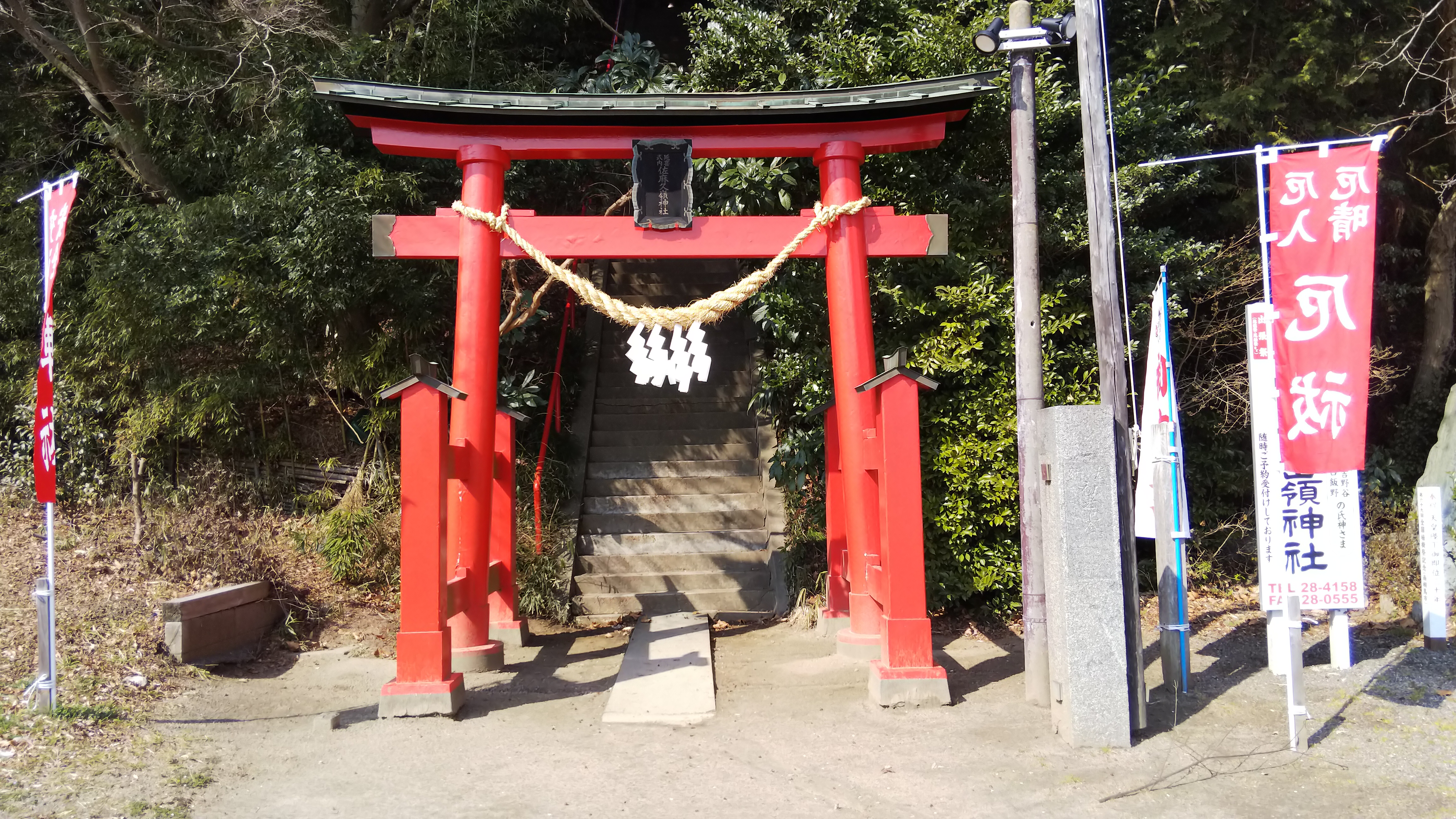 佐麻久嶺神社鳥居